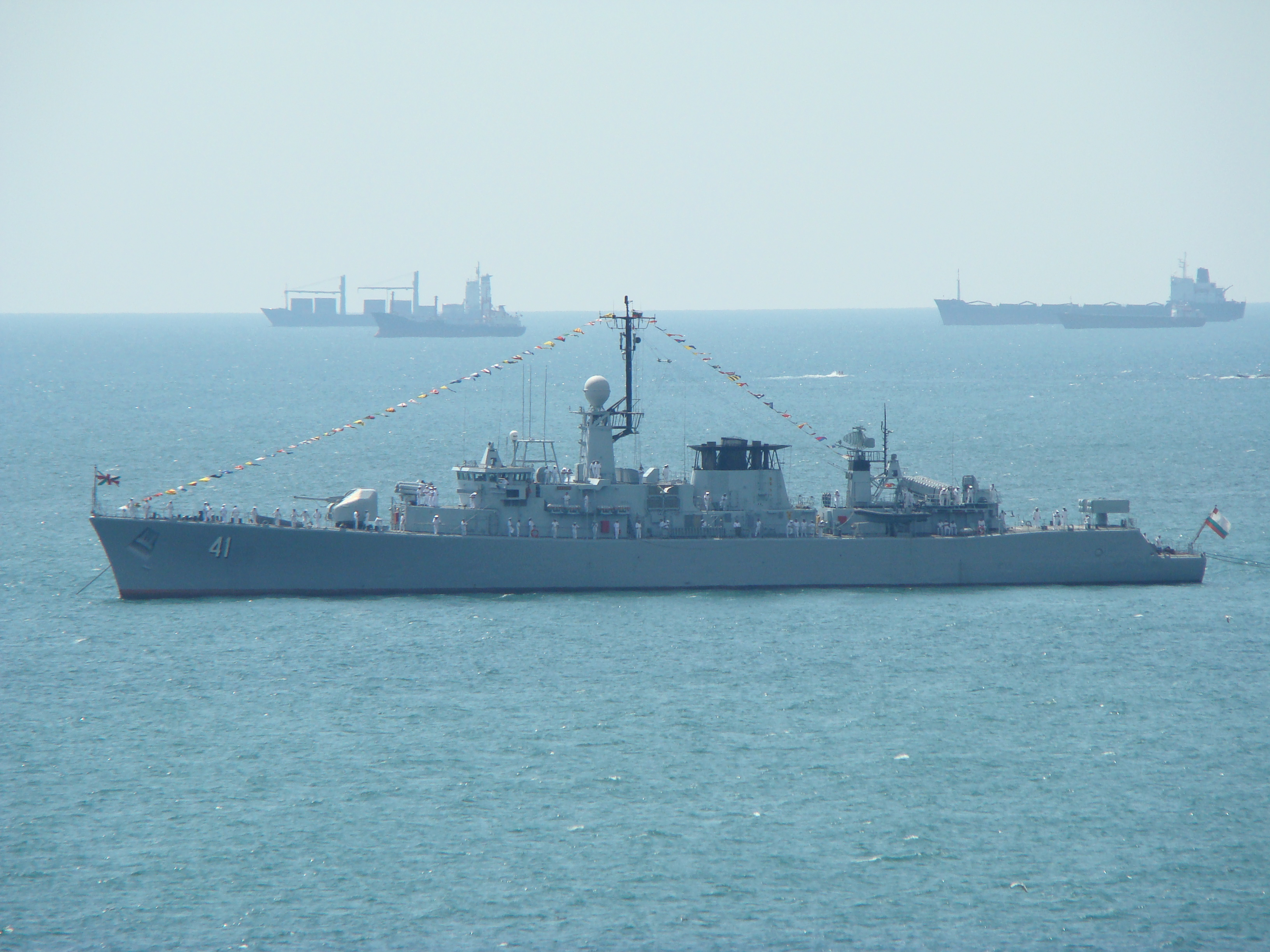 Багатофункціональний фрегат типу «Вілінген», ВМС Болгарії "Дръзки"